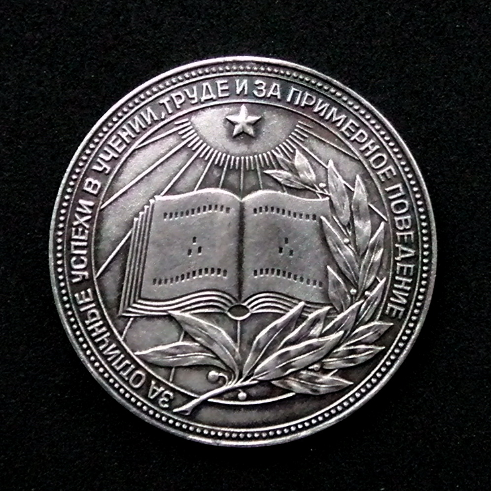 Серебряная медаль, реверс